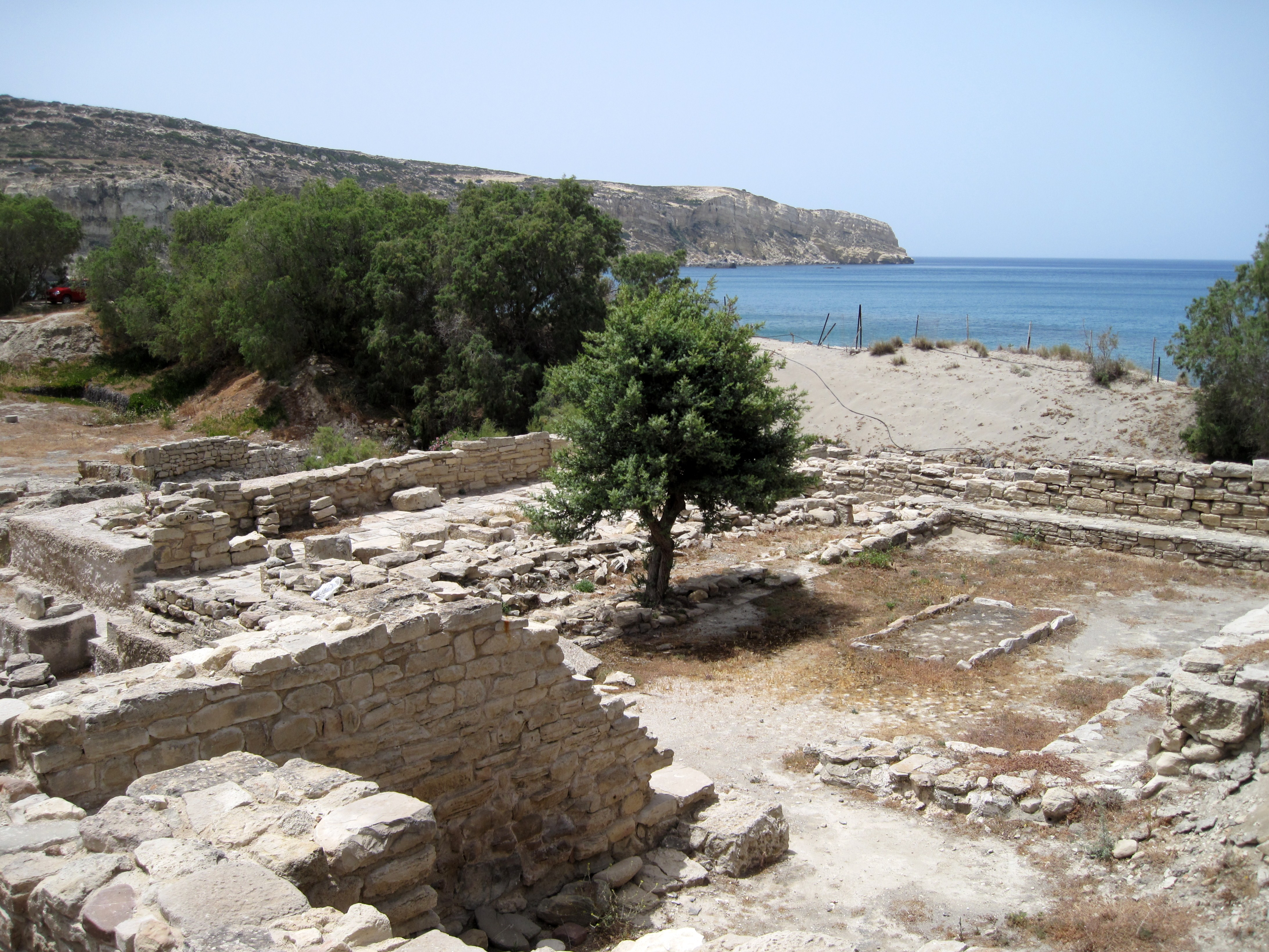 Ausgrabungsstätte der antiken Küstensiedlung Komos (auch Kommos), Gemeinde Tymbaki, Präfektur Iraklio, Kreta, Griechenland